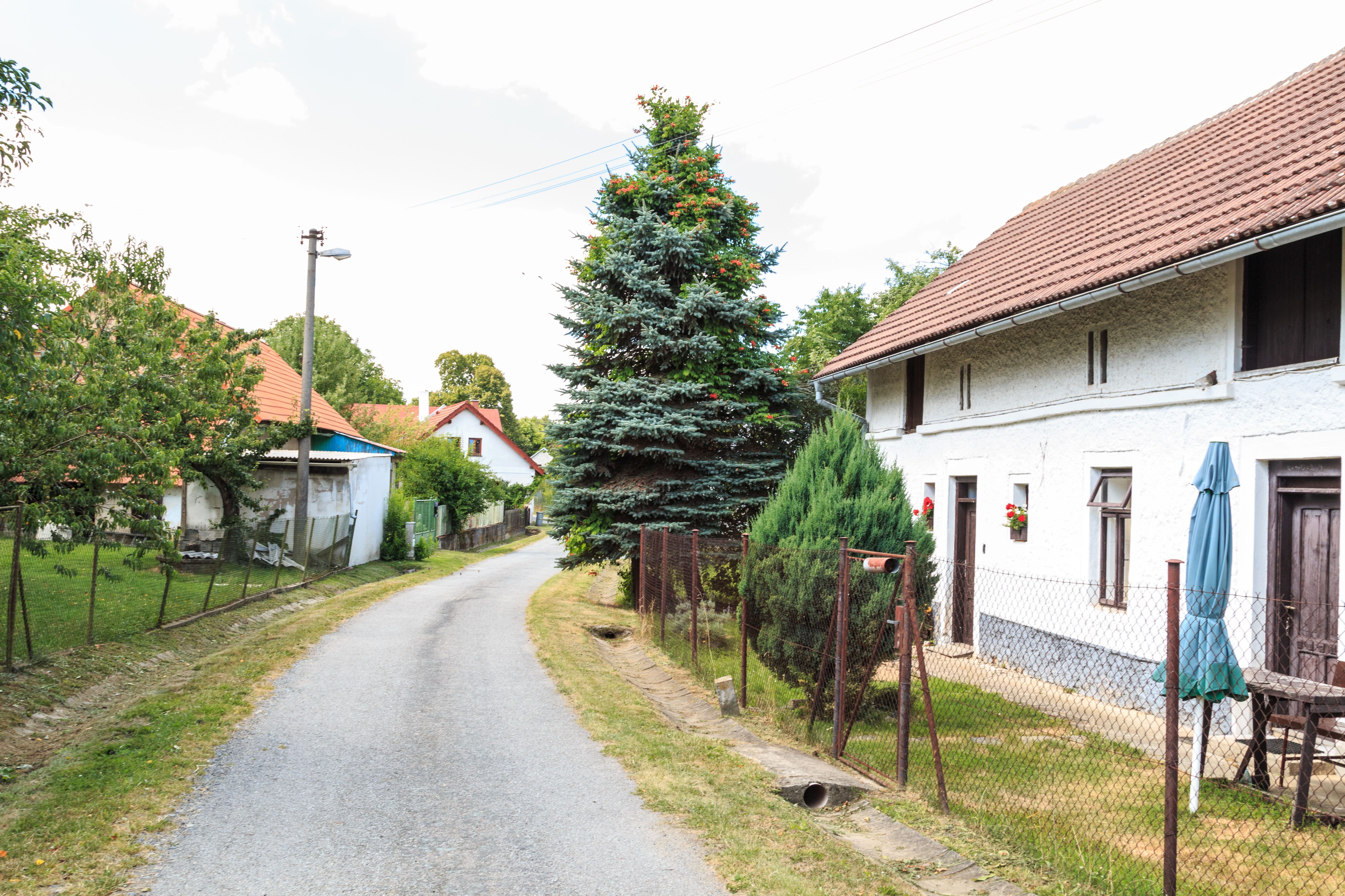 Bučovice eč. 3